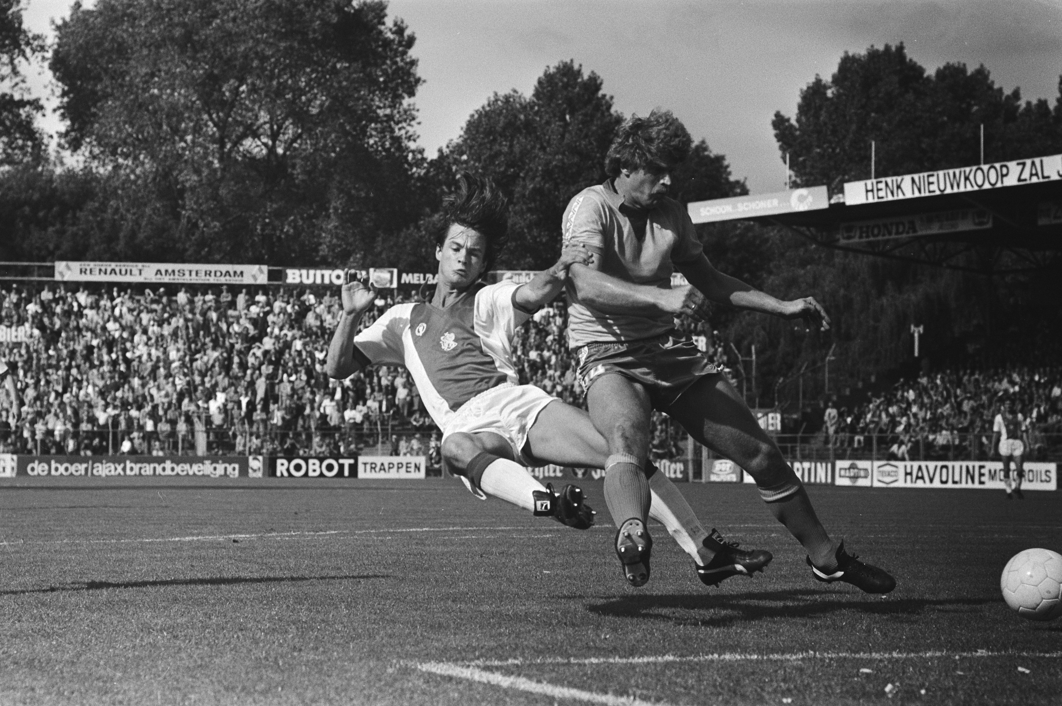 Collectie / Archief : Fotocollectie Anefo Reportage / Serie : Ajax - FC Utrecht 3-2 Beschrijving : Spelmoment Annotatie : Randnummers negatiefstrook: nr. 6 : links Ajaxied Ton Blanker in duel met Henk van de Vlag Datum : 23 september 1979 Locatie : Amsterdam, Noord-Holland Trefwoorden : sport, voetbal Instellingsnaam : AJAX Fotograaf : Bogaerts, Rob / Anefo Auteursrechthebbende : Nationaal Archief Materiaalsoort : Negatief (zwart/wit) Nummer archiefinventaris : bekijk toegang 2.24.01.05 Bestanddeelnummer : 930-4557